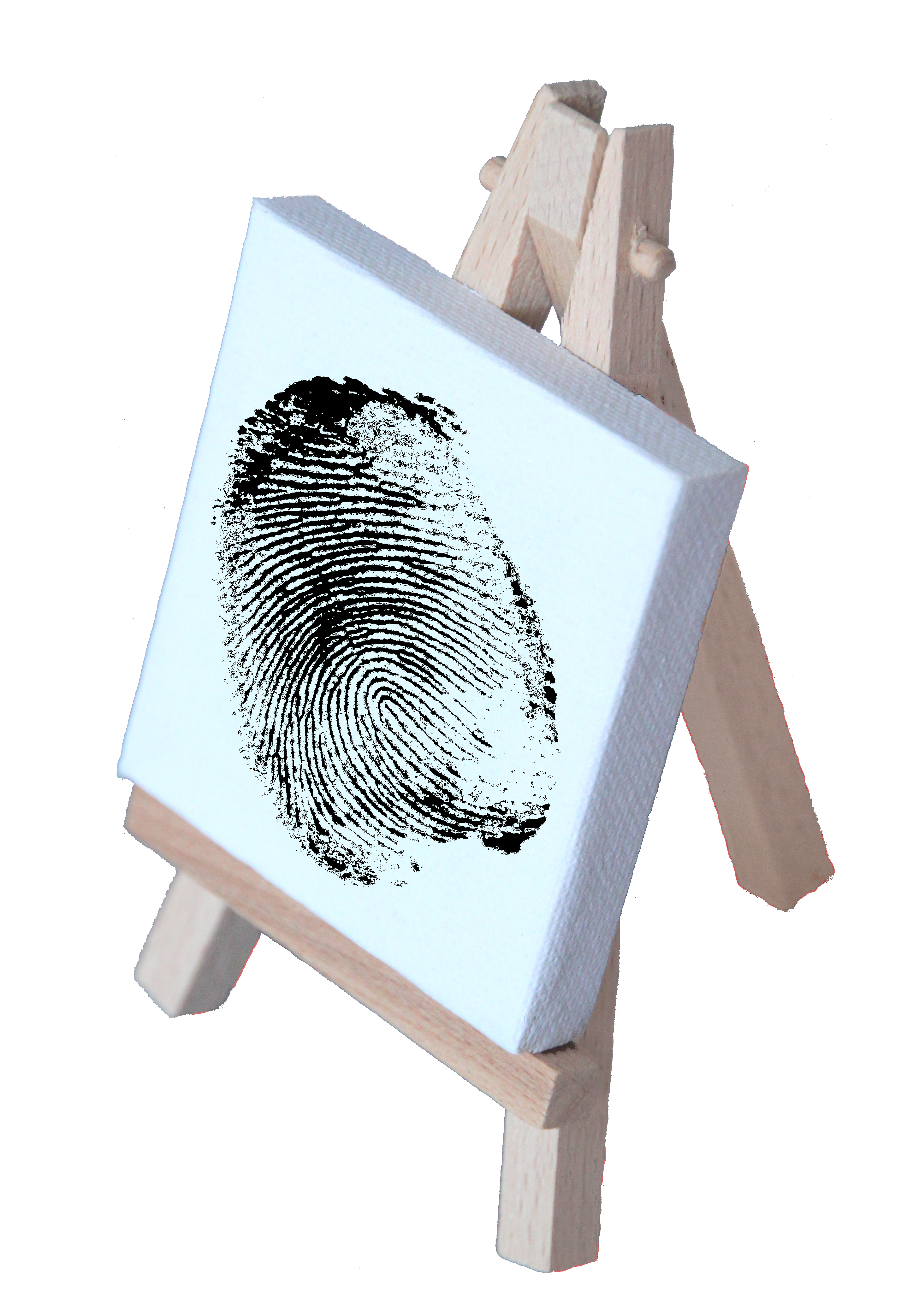 Bildinhalt: Fotomontage: Staffelei mit Leinwand und Fingerabdruck Aufnahmeort: Mannheim, Deutschland